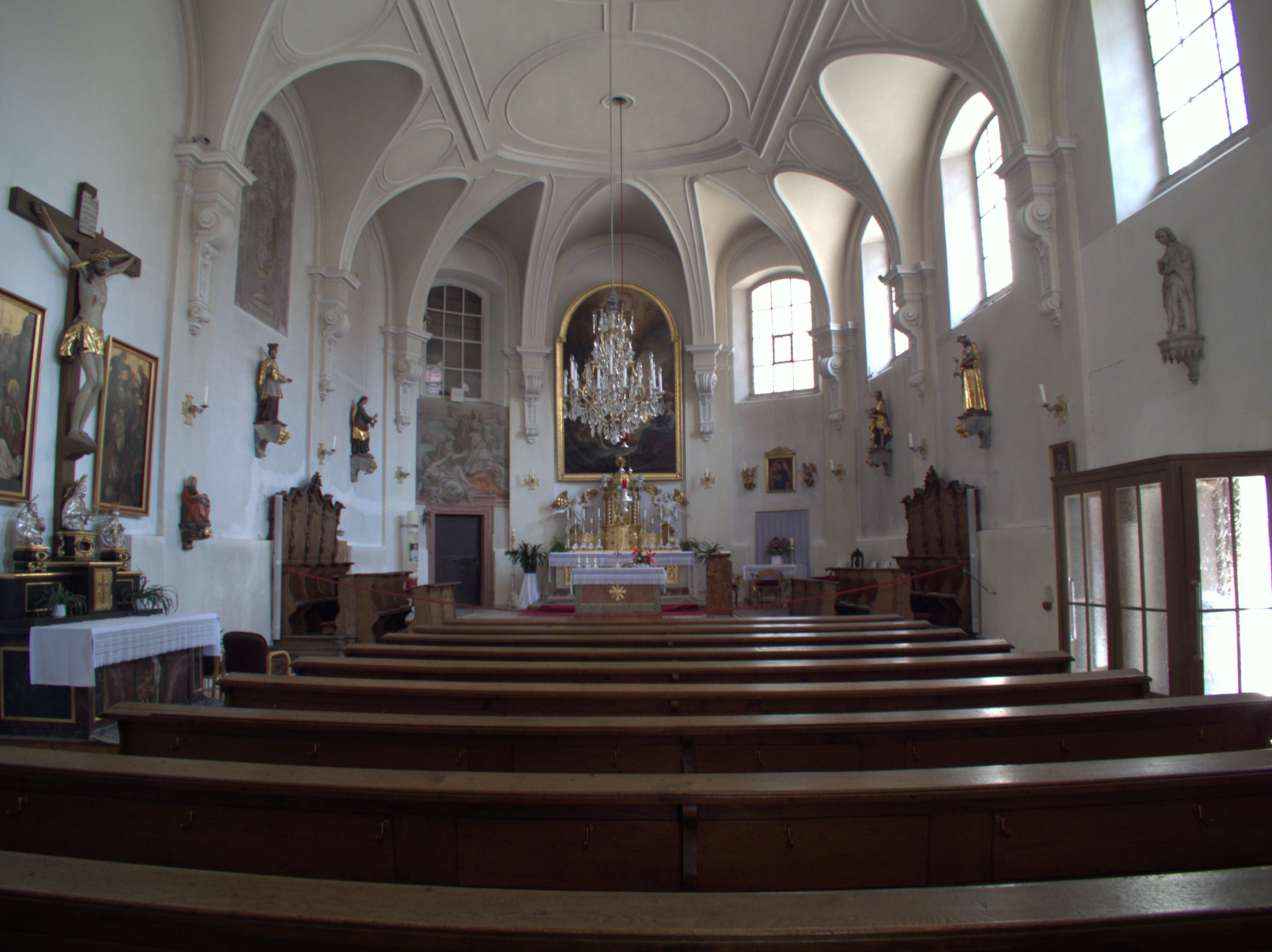 Stiftskirche St Johann in Regensburg am Krauterermarkt 5: Kirchenschiff